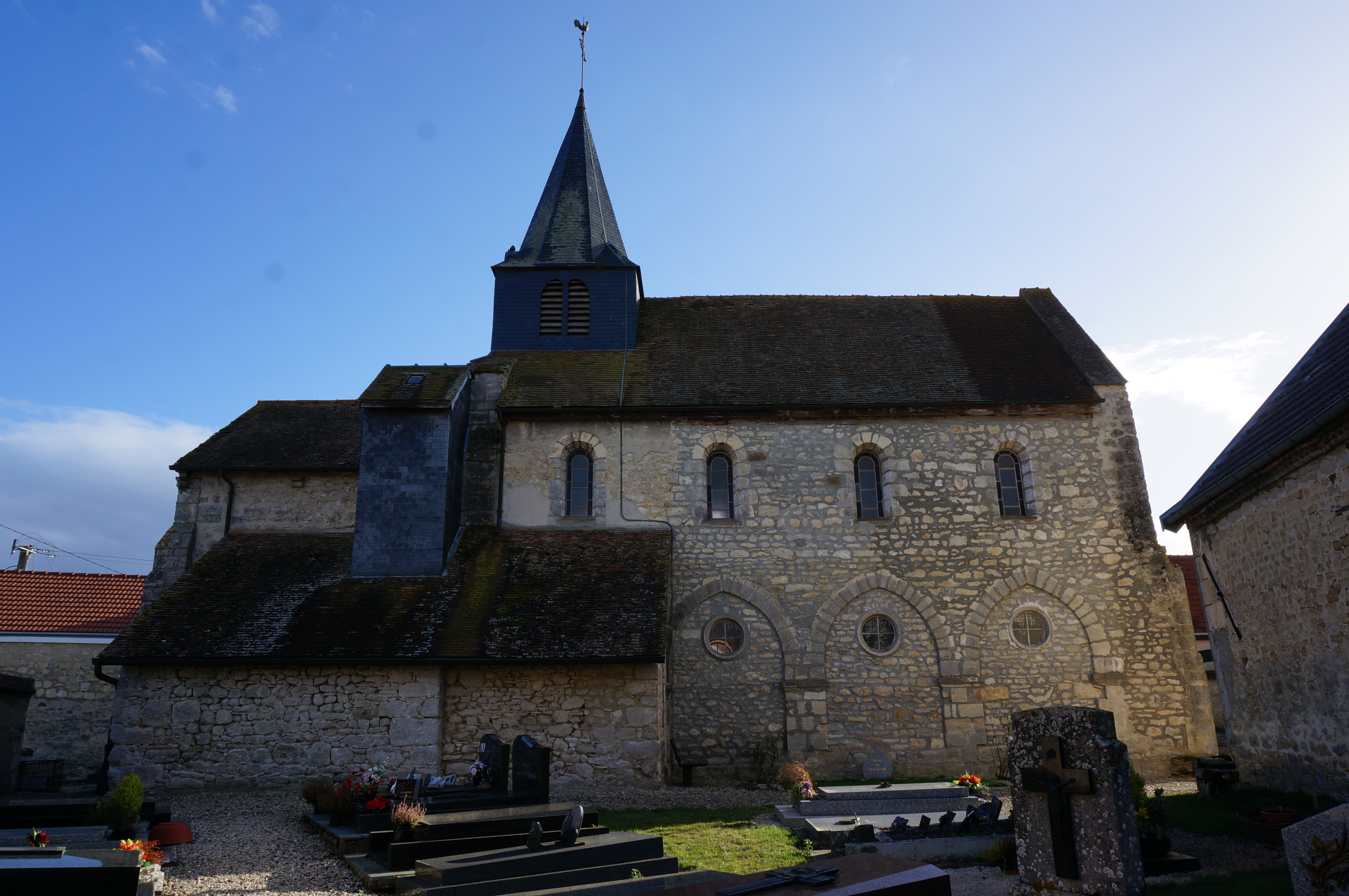 Vues de Guyencourt.